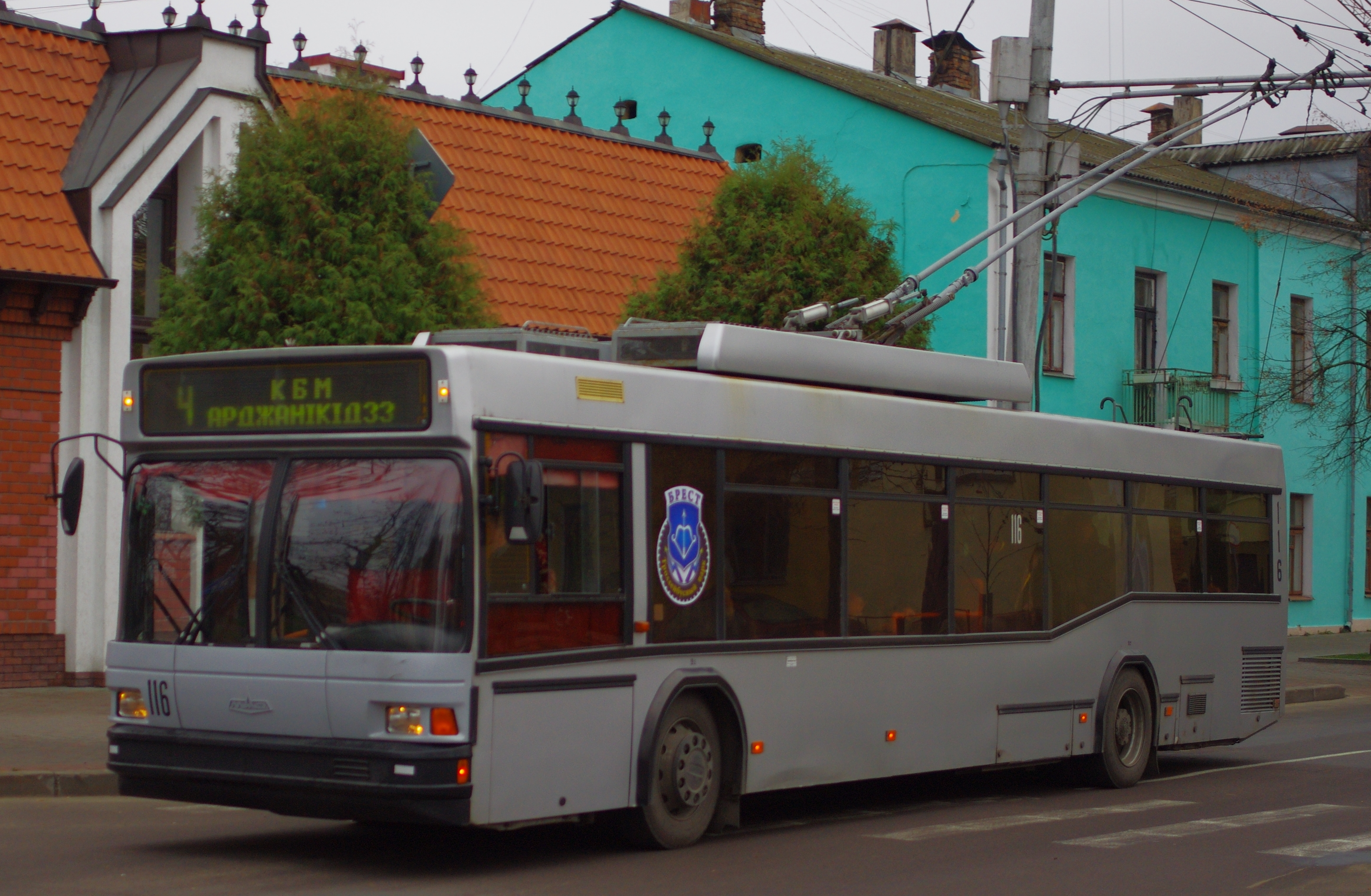 Brest trolleybus 116 20131117_034 Брэсцкі тралейбус